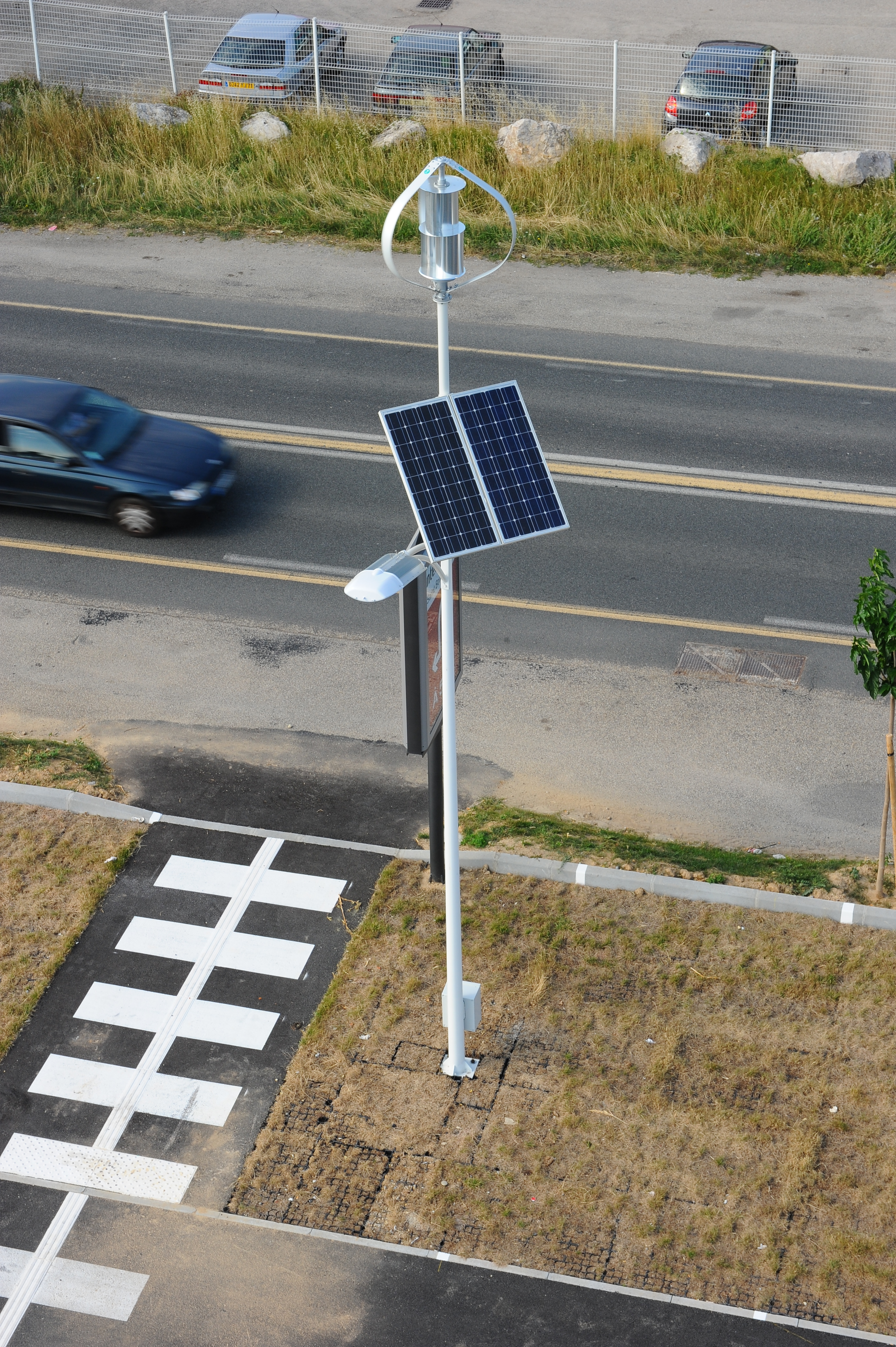 Lampadaire hybride V-Light d'IMEX CGI, intégrant une éolienne verticale et des panneaux photovoltaïques